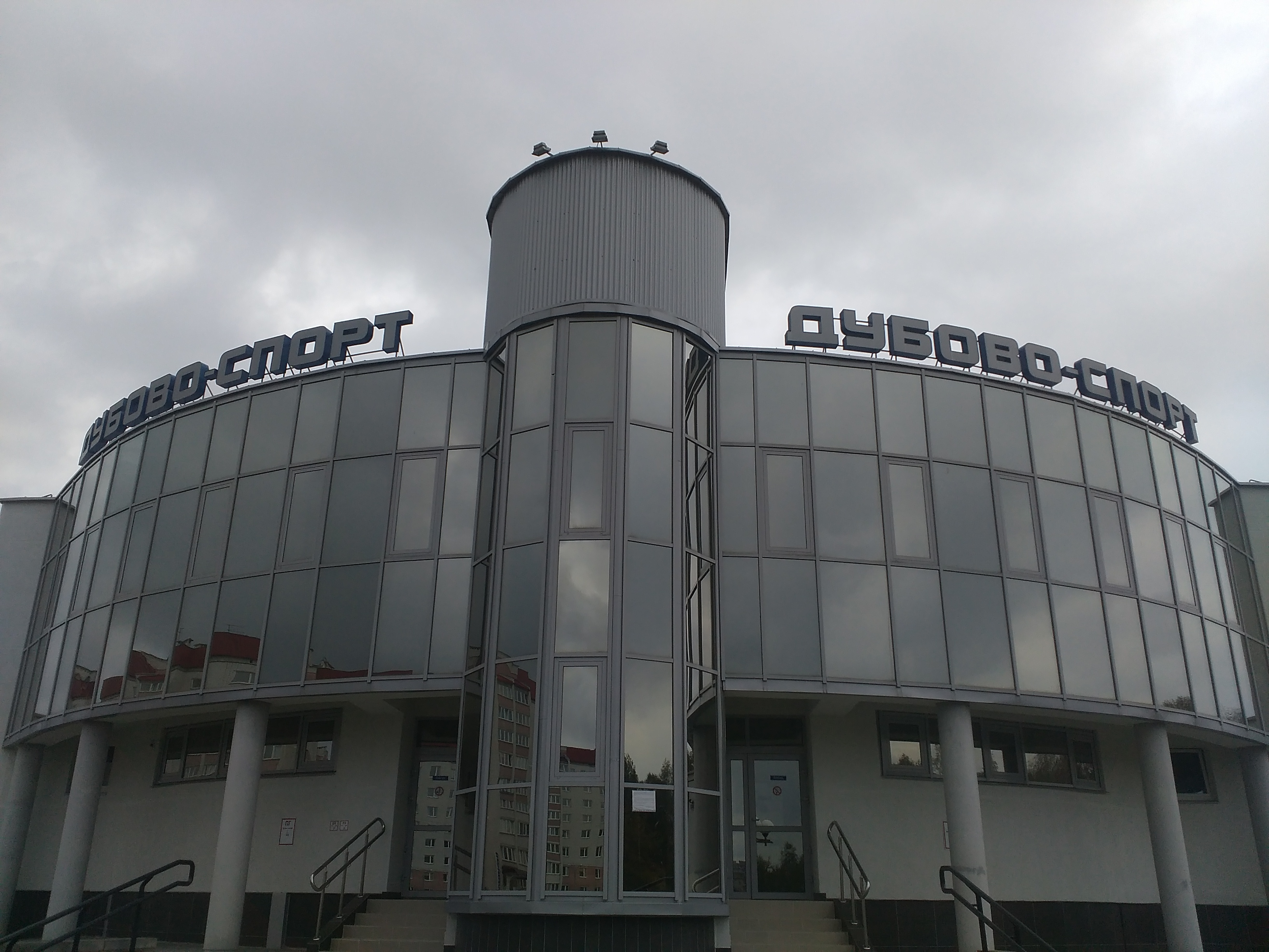 Галоўны ўваход на стадыён, Баранавічы